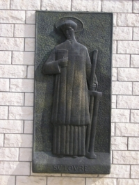 reljef Sv. Lovre u bronci, rad Radovana Duhovića